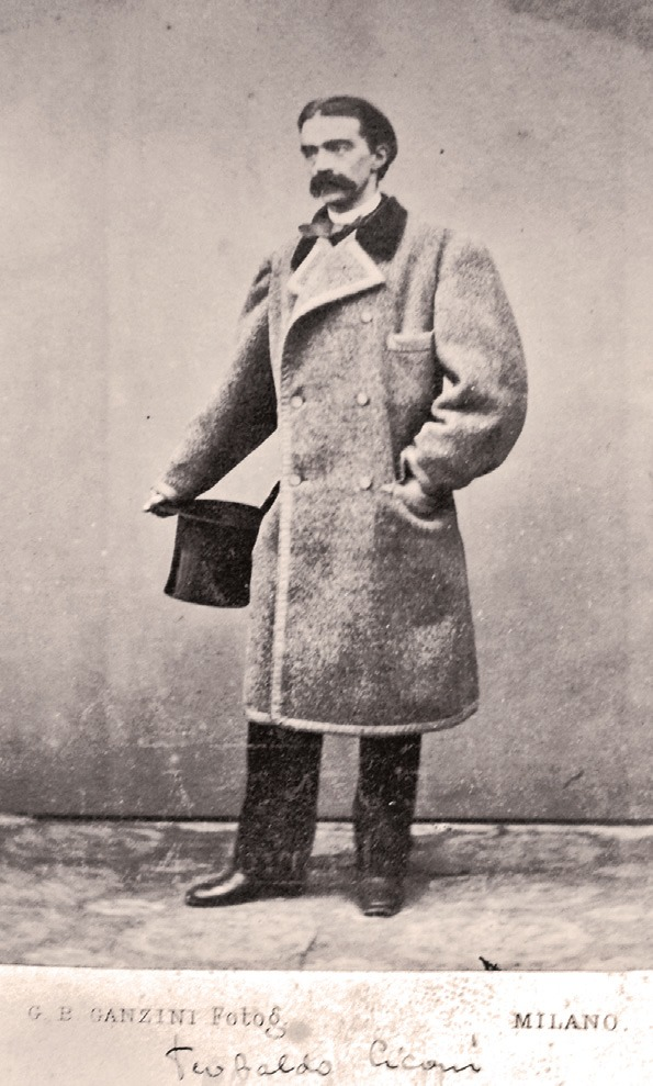 Il giornalista Teobaldo Ciconi (Udine, Biblioteca civica, Album fotografici).